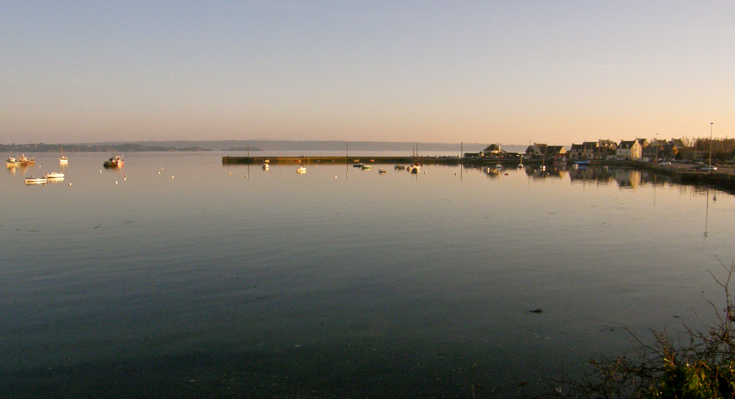 Tombée du jour sur le port du Tinduff à PLOUGASTEL-DAOULAS